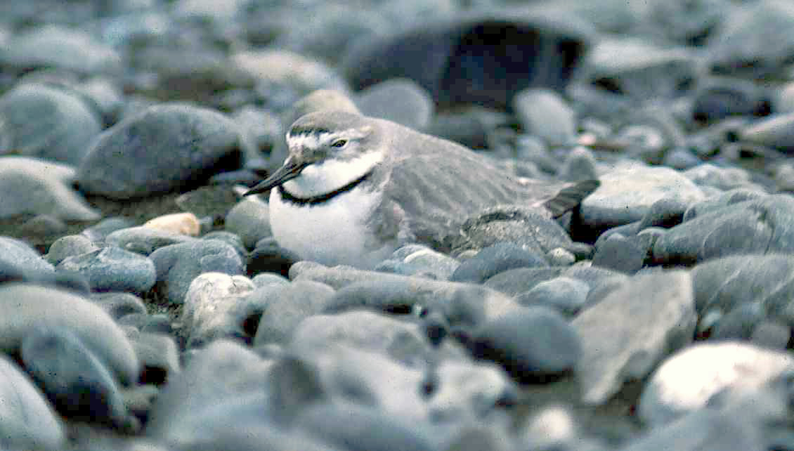 Wrybill sitting on eggs